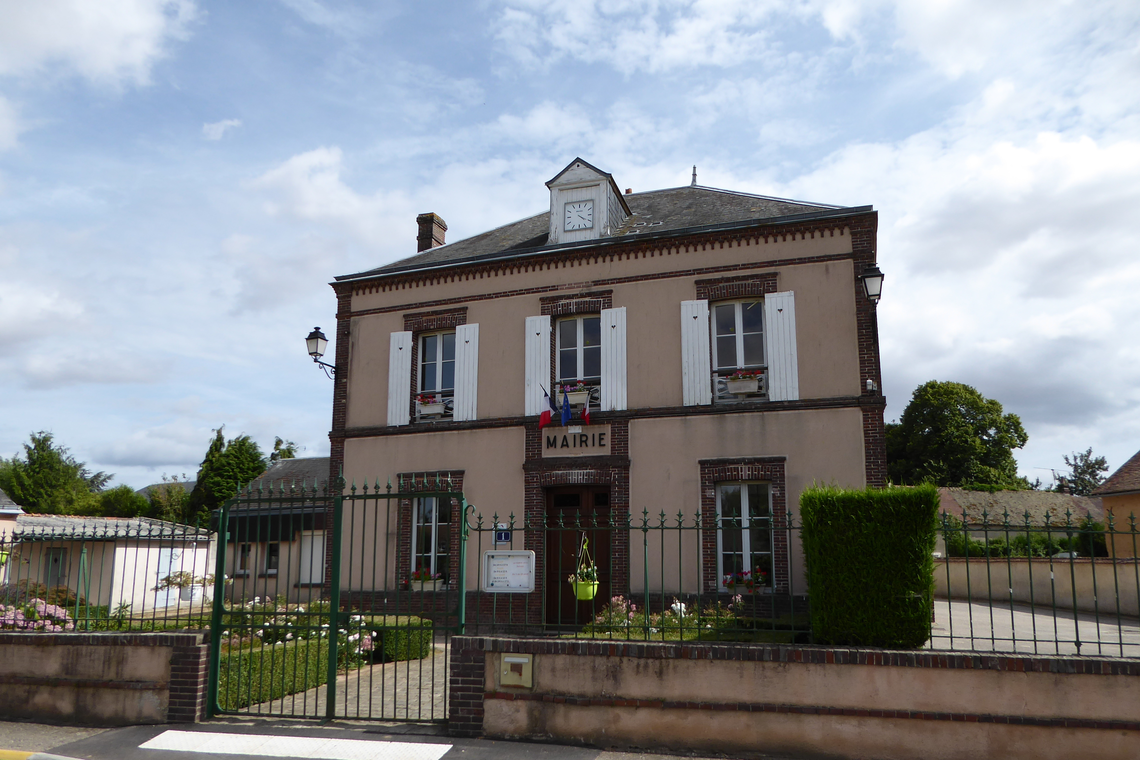 Mairie de Germainville, Eure-et-Loir (France).